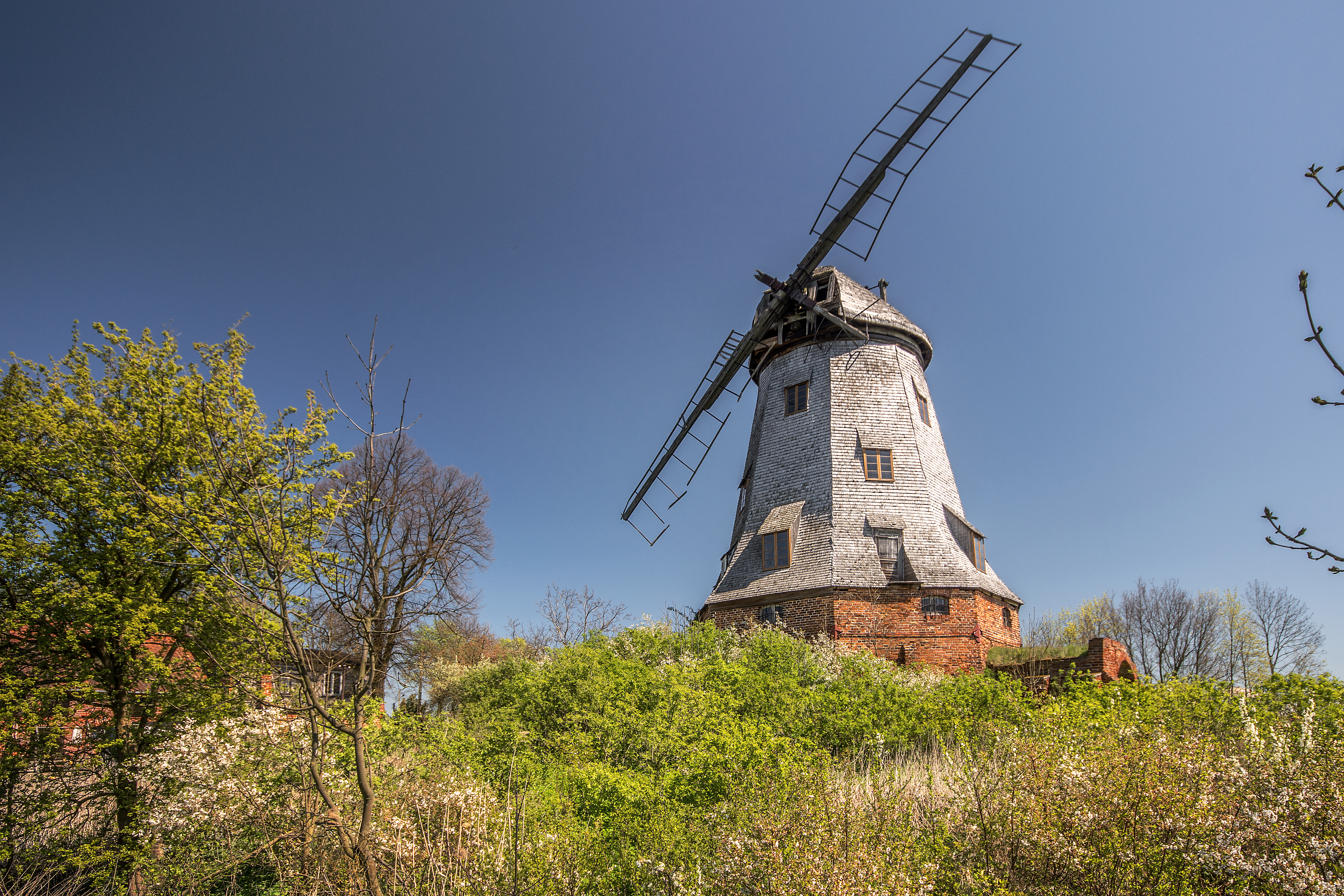 Palczewo, wiatrak holender, XIX